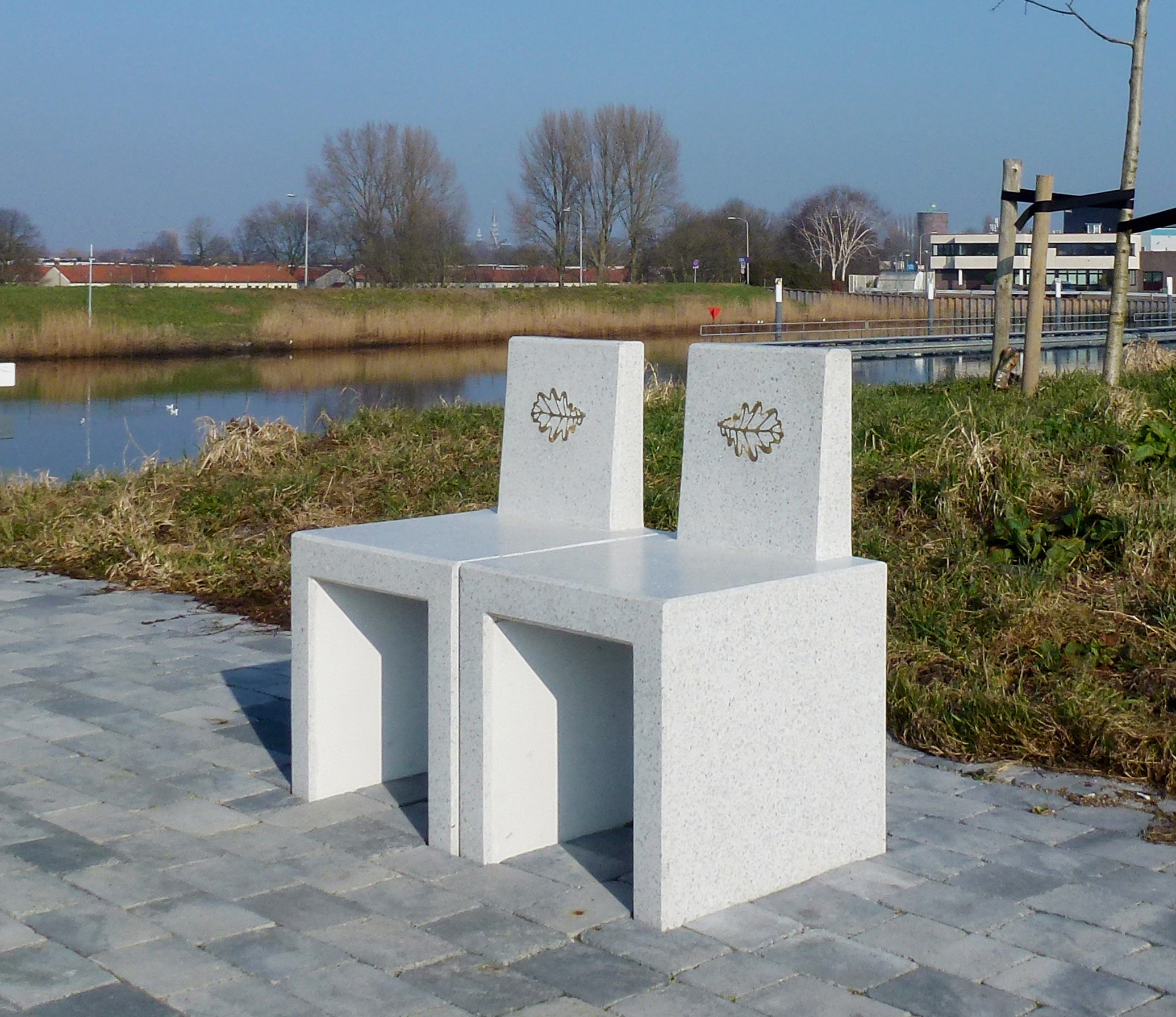 Kunstwerk van Karola Pezarro als rustpunt aan de Hollandse IJssel en de N207. Een van de acht Hij-zitjes die op deze locatie geplaatst zijn. Materiaal is witte terrazzo met een messing eikenblaadje in de rugleuning. Langs de Hollandse IJssel tussen Gouda en Rotterdam zijn meerdere zitjes geplaatst.